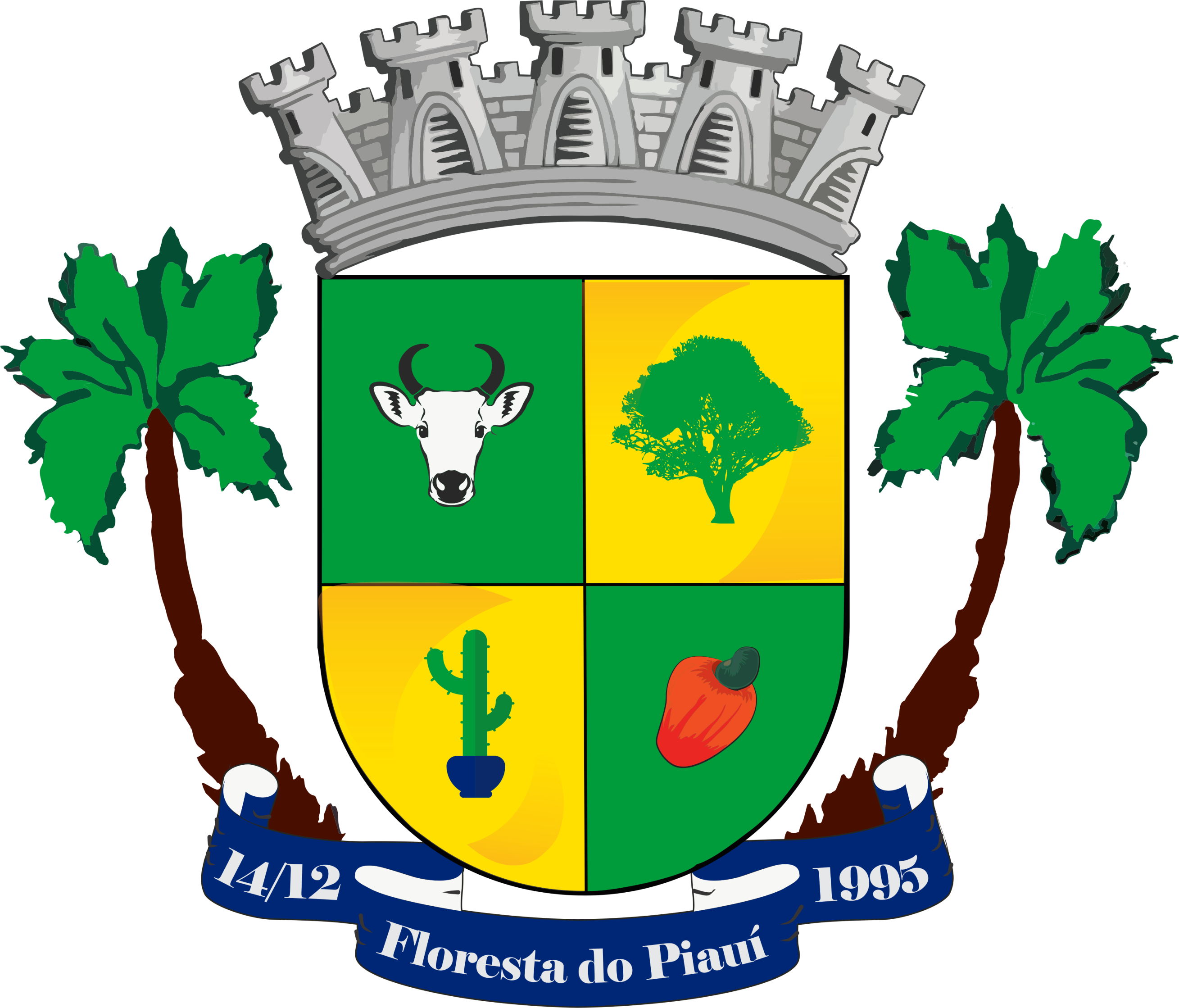 Brasão de Floresta do Piauí - reformado segundo as regras da heráldica